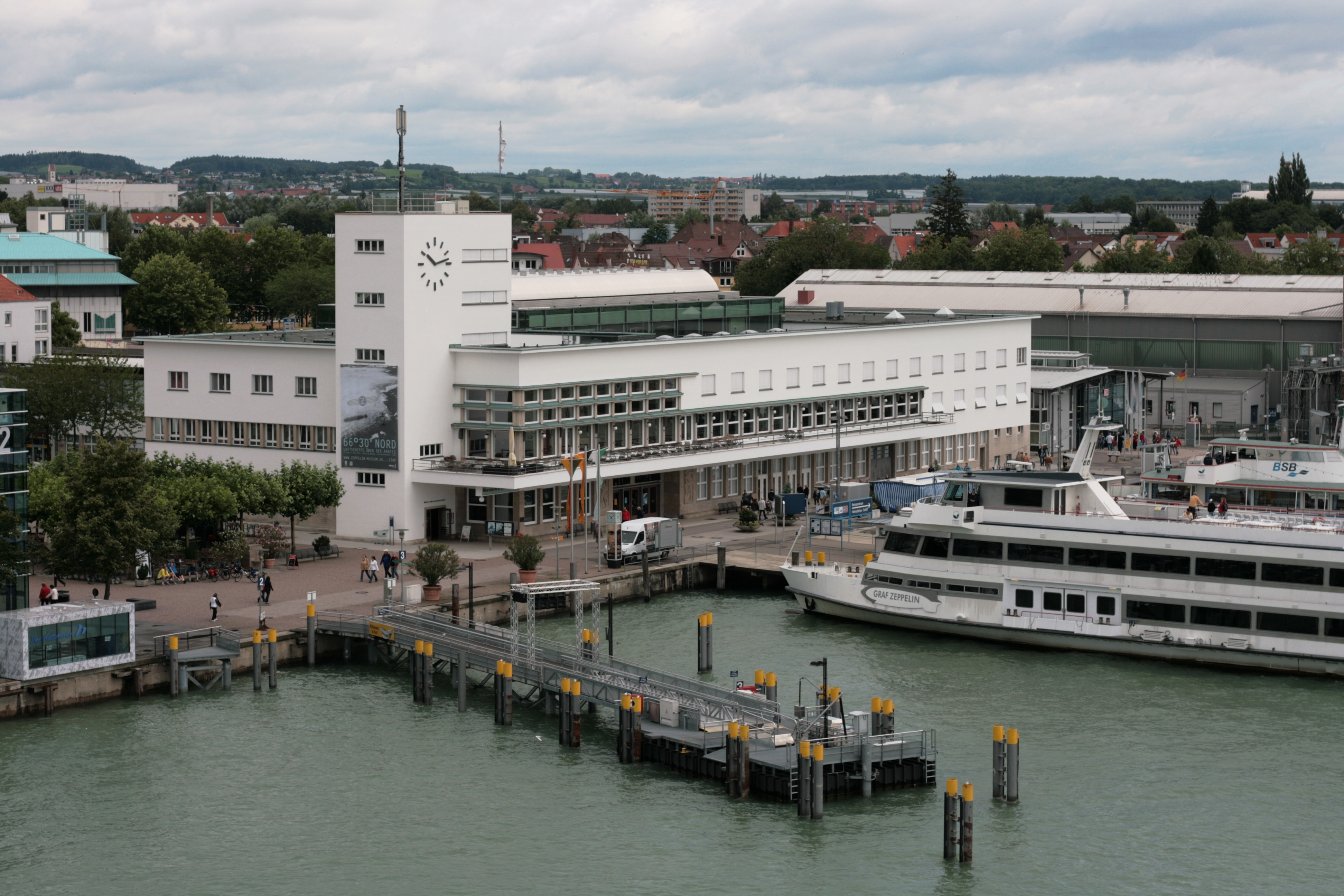 Das Gebäude des Zeppelinmuseum Friedrichshafen am Hafen. Davor Fahrgastschiff 'Graf Zeppelin' und die Katamaran-Anlegestelle der Linienverbindung Konstanz-Friedrichshafen.